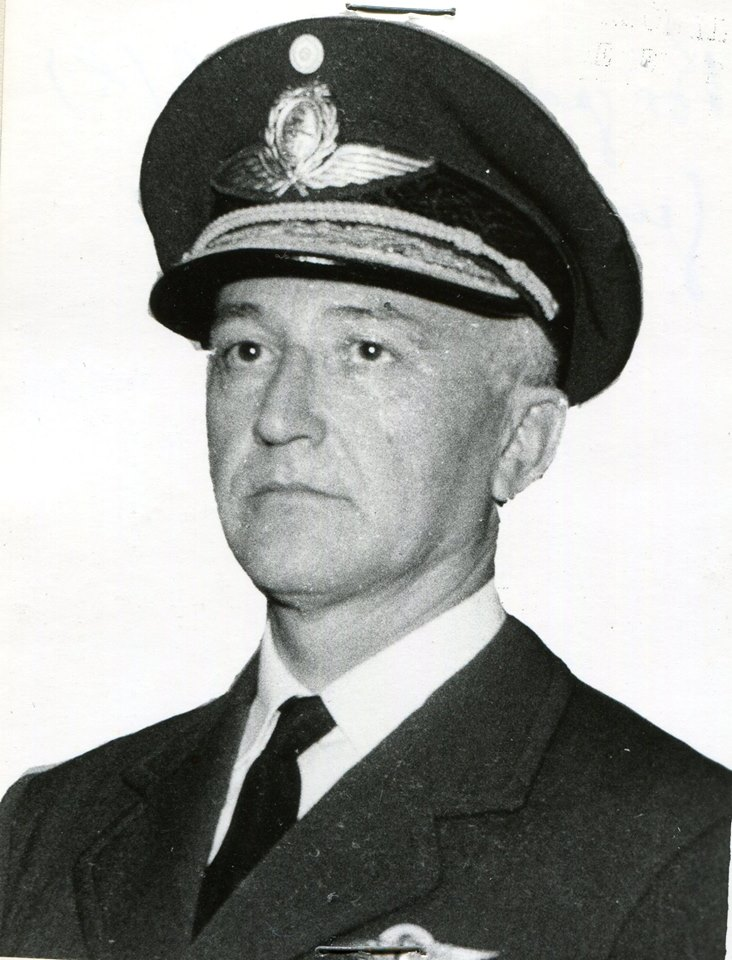 El Brigadier General Guillermo Zinny.